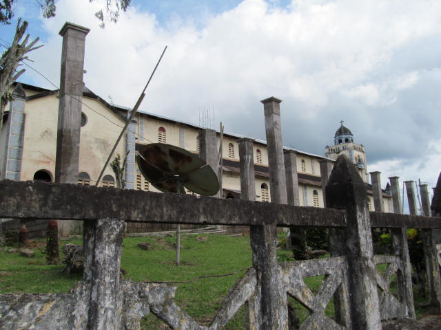 Située en bordure de la Sanaga le fleuve le plus long du Cameroun